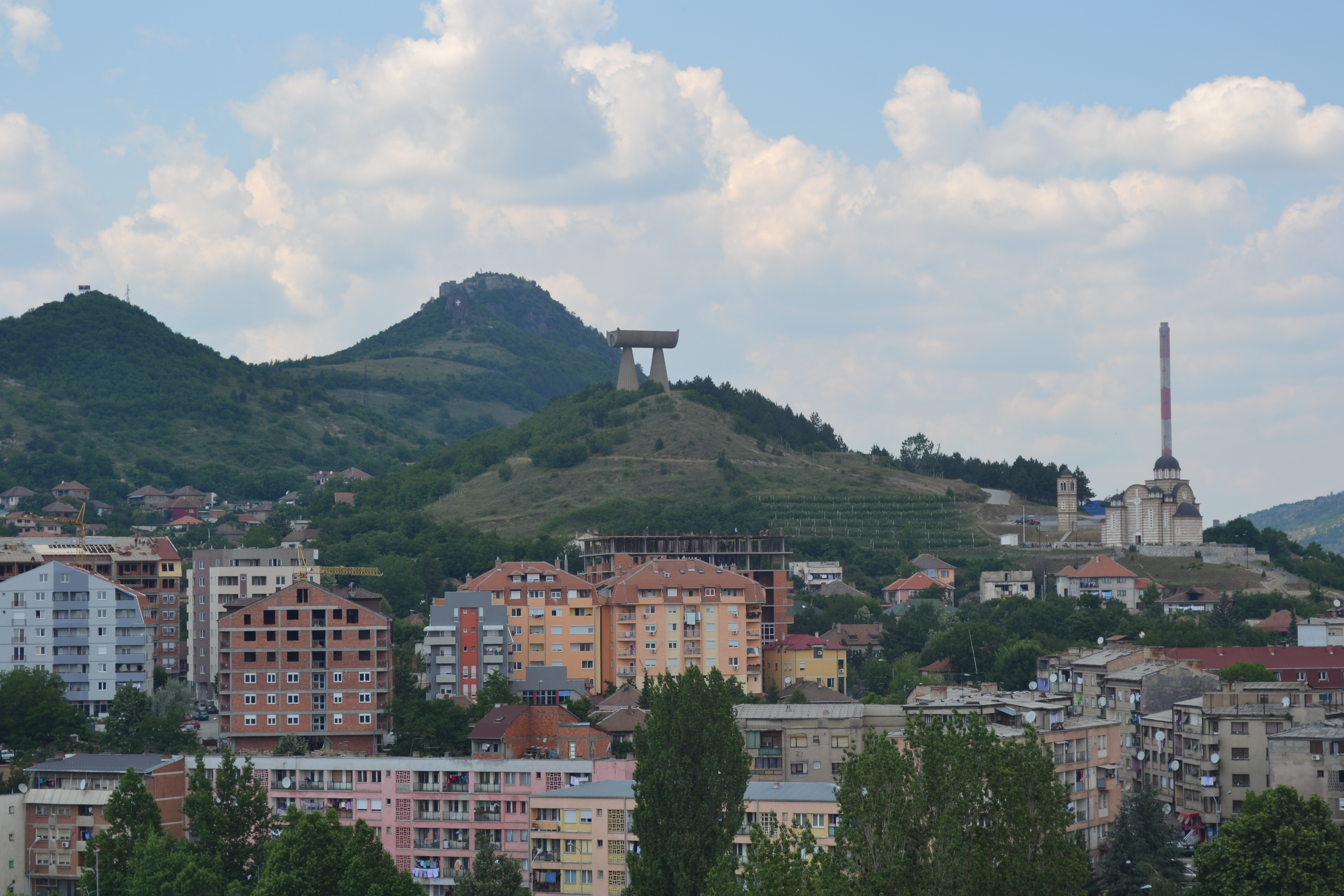 Pamje e pjesës veriore të qytetit të Mitrovicës